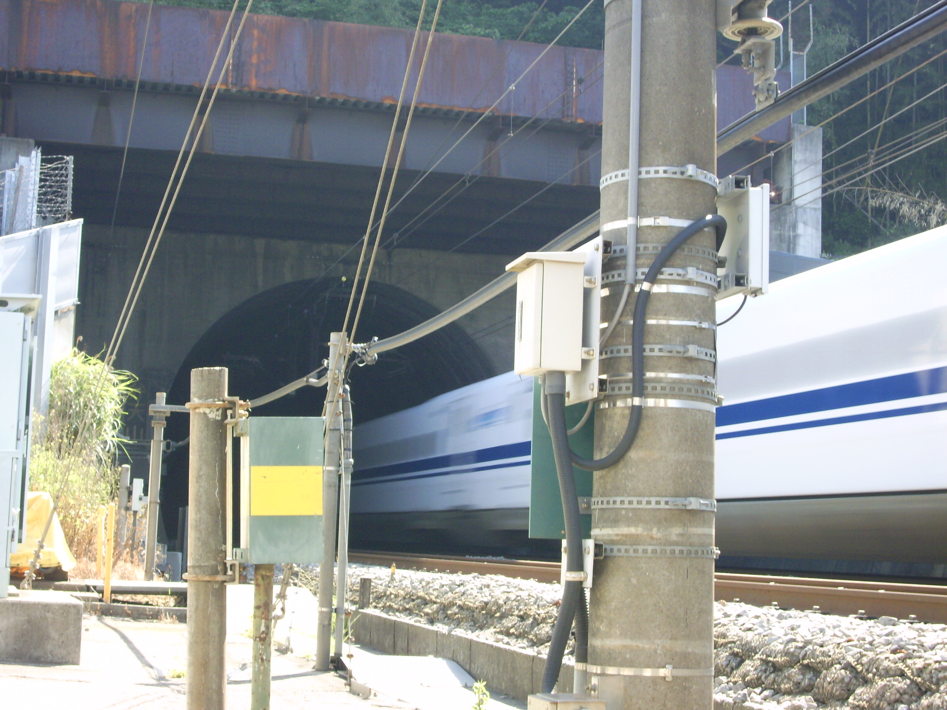 東海道新幹線鴨宮モデル線区間では最長となる小田原市の弁天山トンネル（1355m） ここで初めて耳ツン現象が確認され、対策として車両の気密性向上が図られ幾度も実験が行われた ㊟カメラを起動すると日付機能が出荷時のものに初期化されるため、ファイル履歴の撮影・投稿日時とメタデータの原画像データの生成日時が異なります